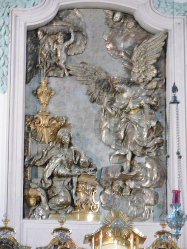 Andreas Faistenberger: Verkündigungsrelief am Altar der Bürgersaalkirche in München.